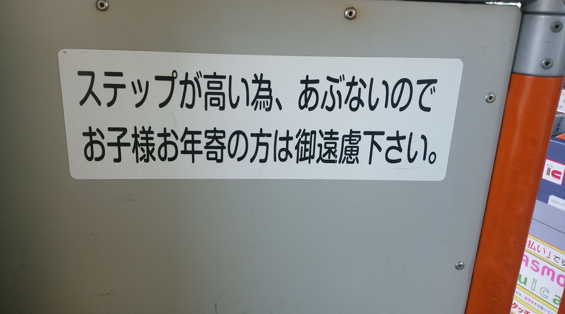 神奈中バスた2のホイール上の席に記載されている注意書き。